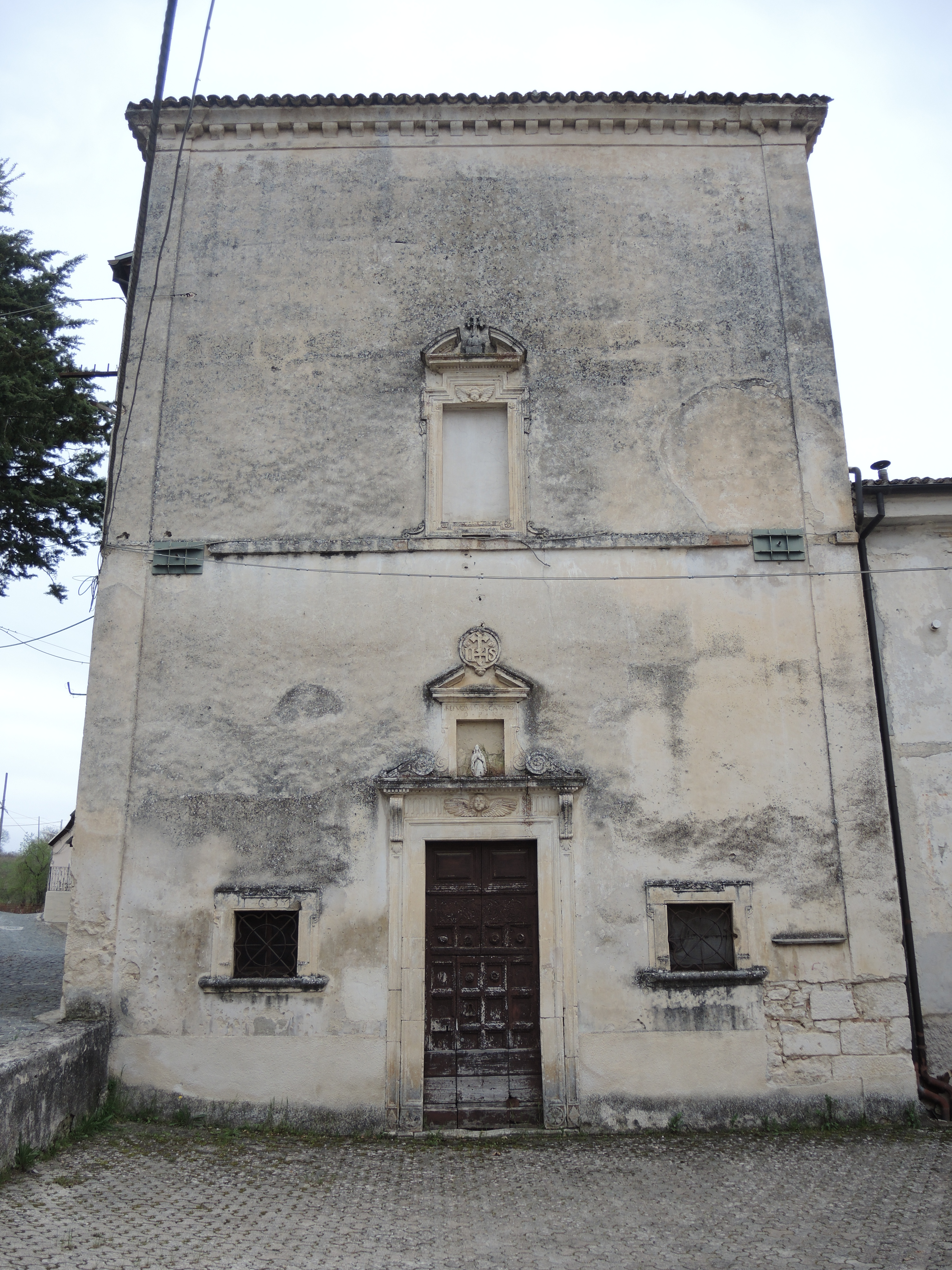 Beffi: Chiesa della Madonna del Rifugio